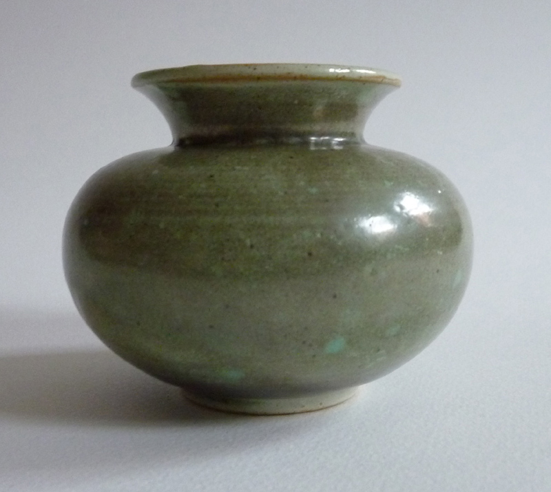 Otto Lindig, Vase, gemarkt, Höhe 7 cm, Privatbesitz